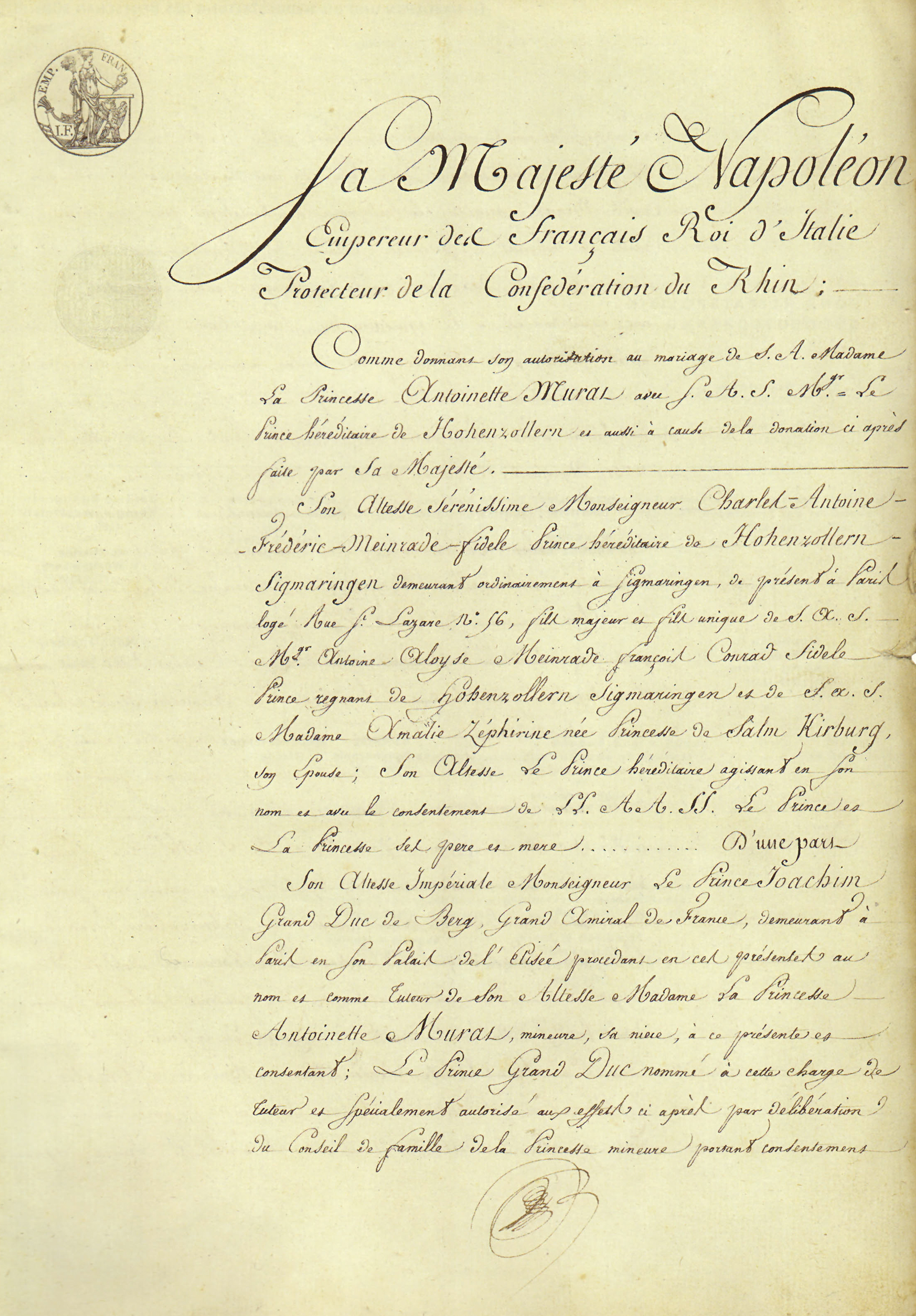 Heiratsvertrag des Erbprinzen Karl von Hohenzollern-Sigmaringen mit Antoinette Murat, 1808 (StAS FAS HS 1-80 T 1-6 R. 53, 158a)